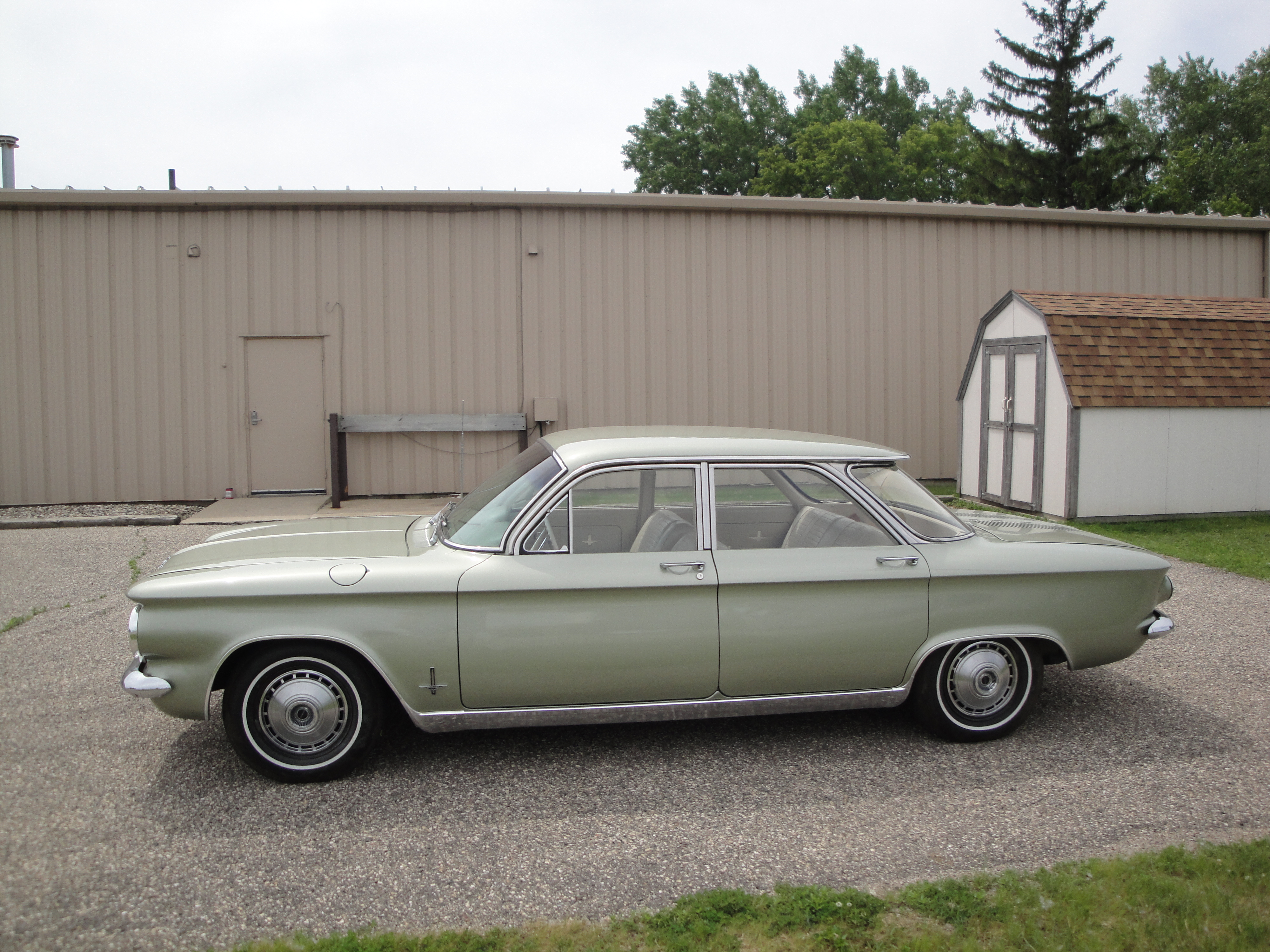 64 Chevrolet Corvair Monza